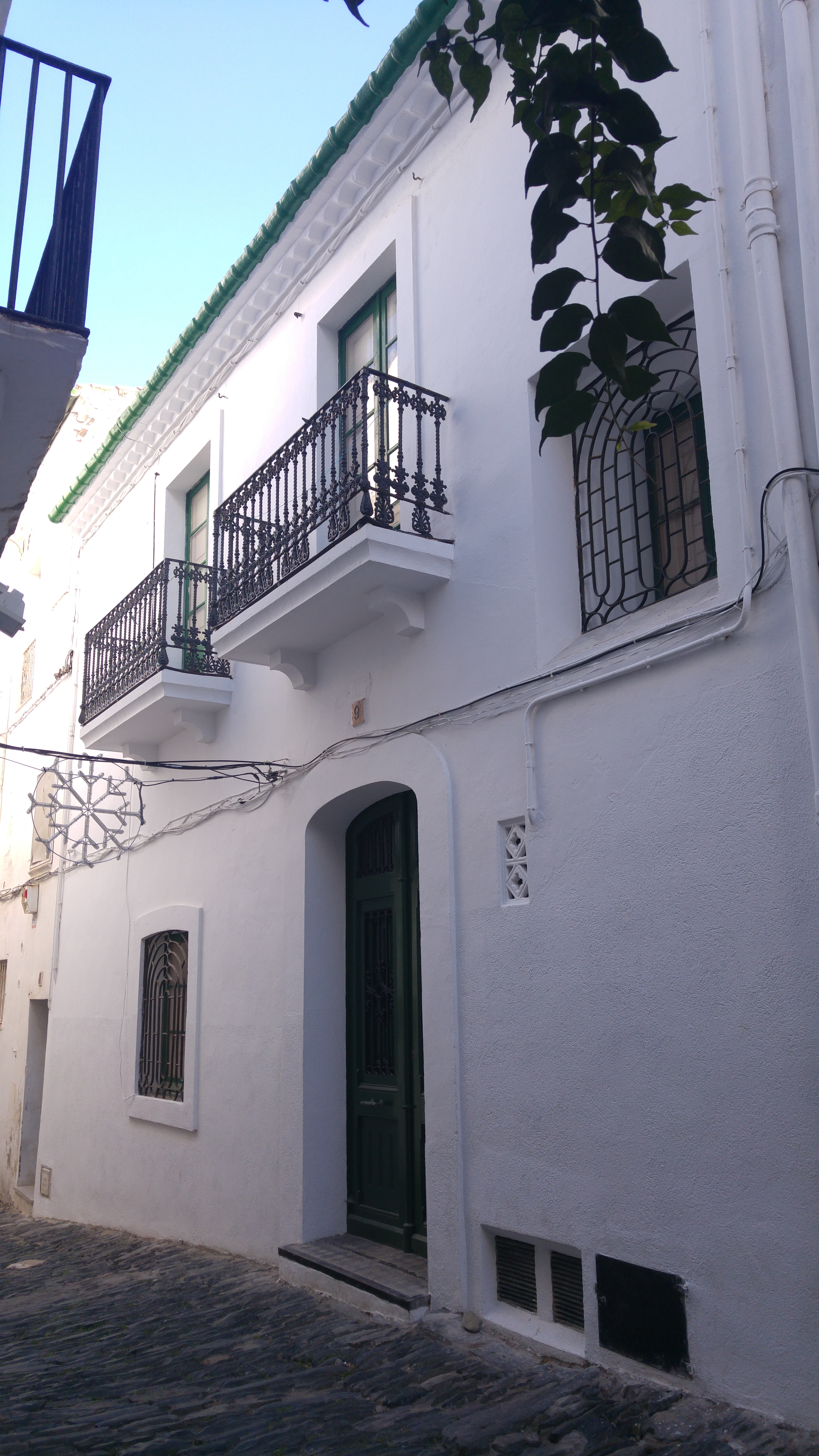 Casa des Portal (Cadaqués)